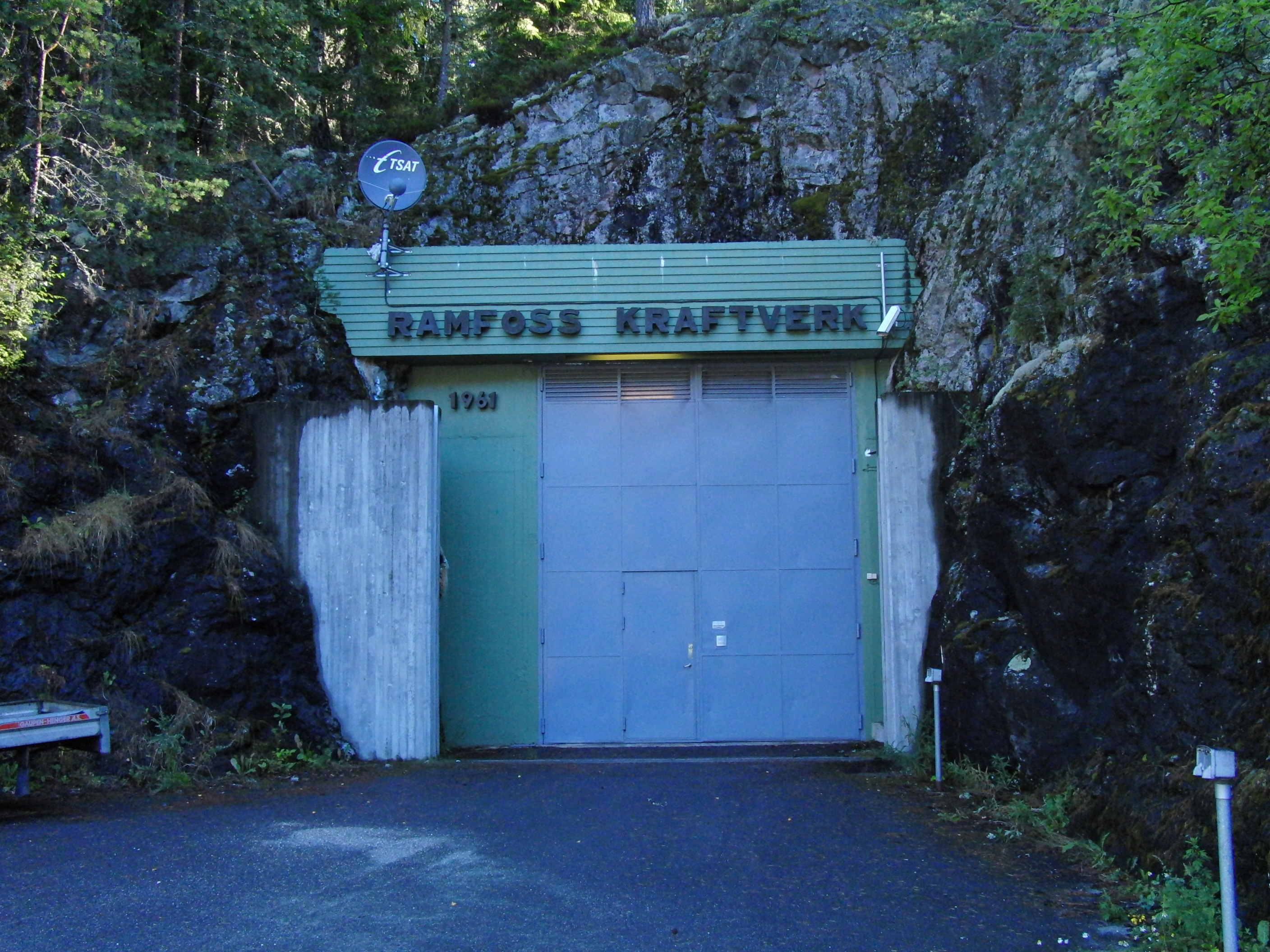 Ramfoss kraftverk